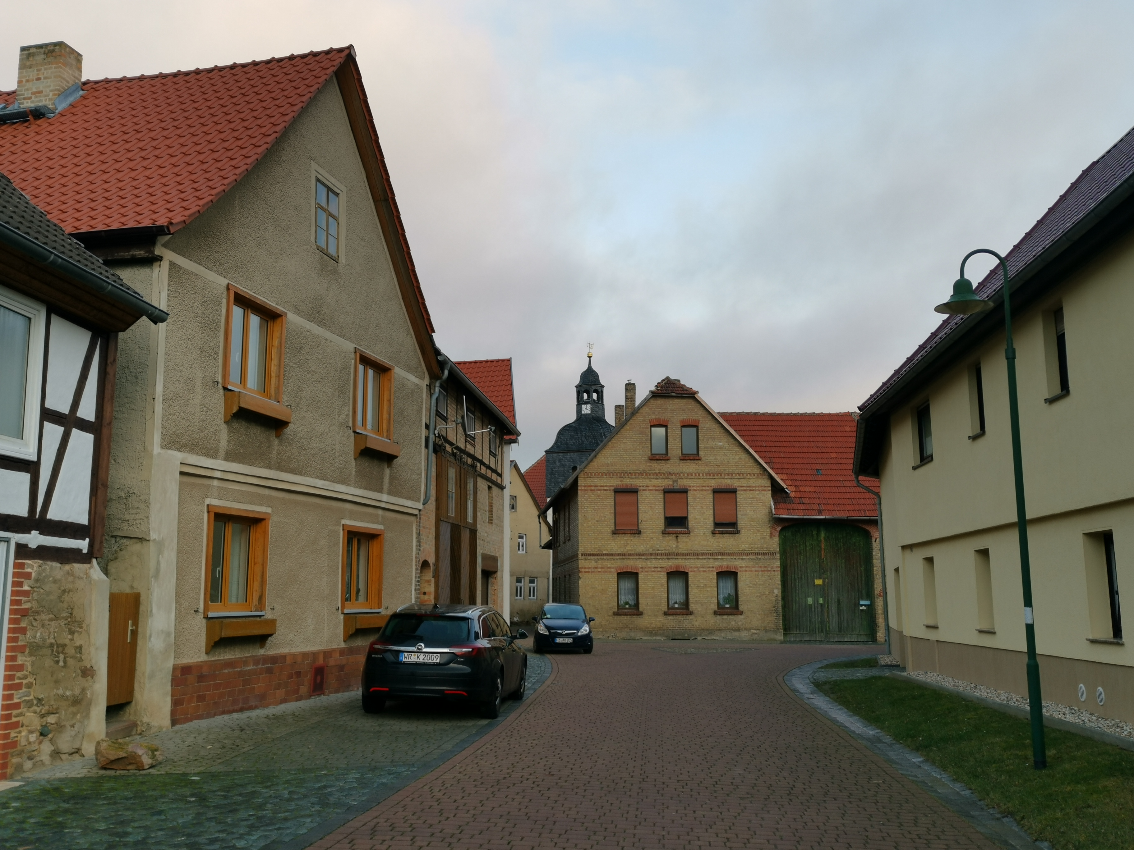 Kirchstraße 2-6 in Timmenrode